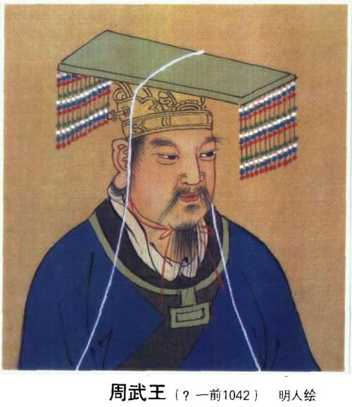 周武王像，明人绘